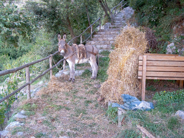 Asino ad Agerola (Na).